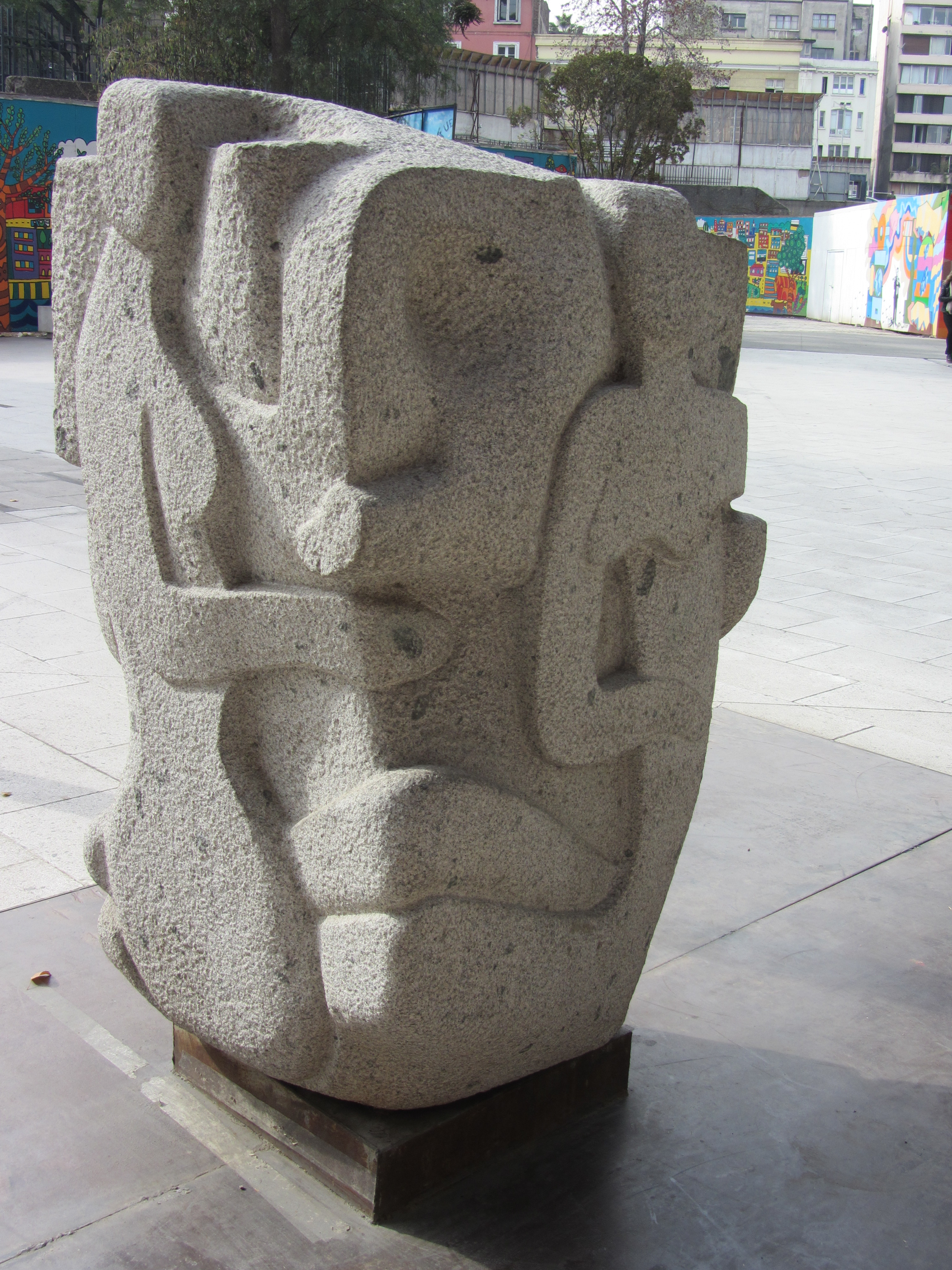 Puerta al espacio, escultura de Samuel Román en el Centro Cultural Gabriela Mistral, Santiago de Chile.